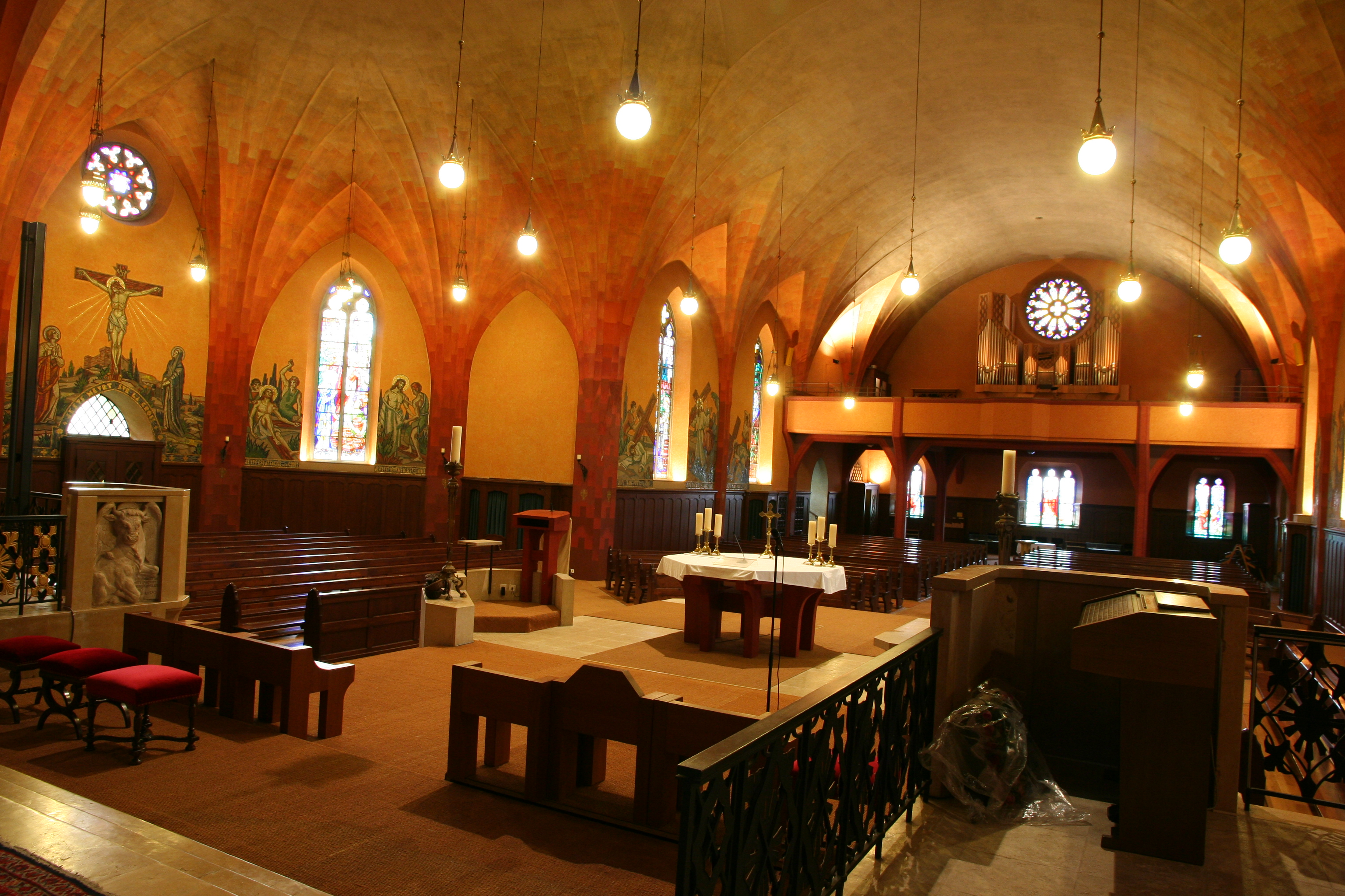 Römisch-katholische Kirche St. Maria Biel/Bienne, Oberkirche mit Blick zur Orgelempore